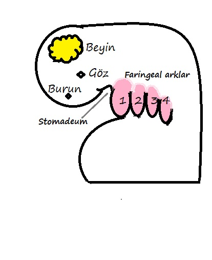 Faringeal ark çizimi